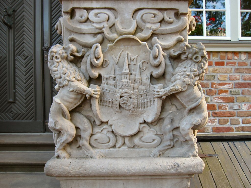 Wappen der Stadt Jever an der Treppe zum Rathaus